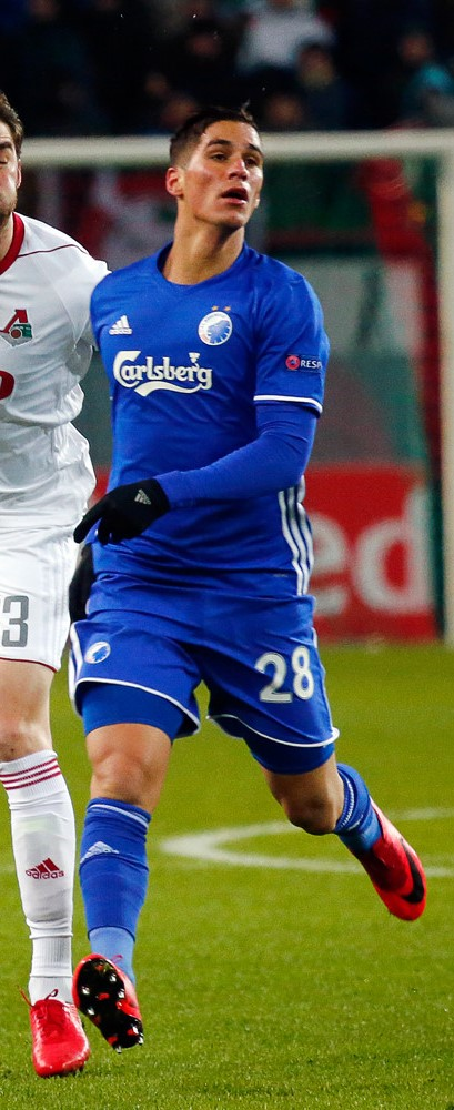 Pieros Sotiriou